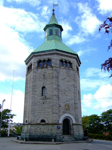 Valbergtaarnet, Stavanger, Norway